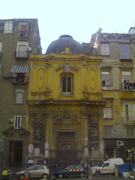 Facciata Santa Maria la Colonna, Napoli